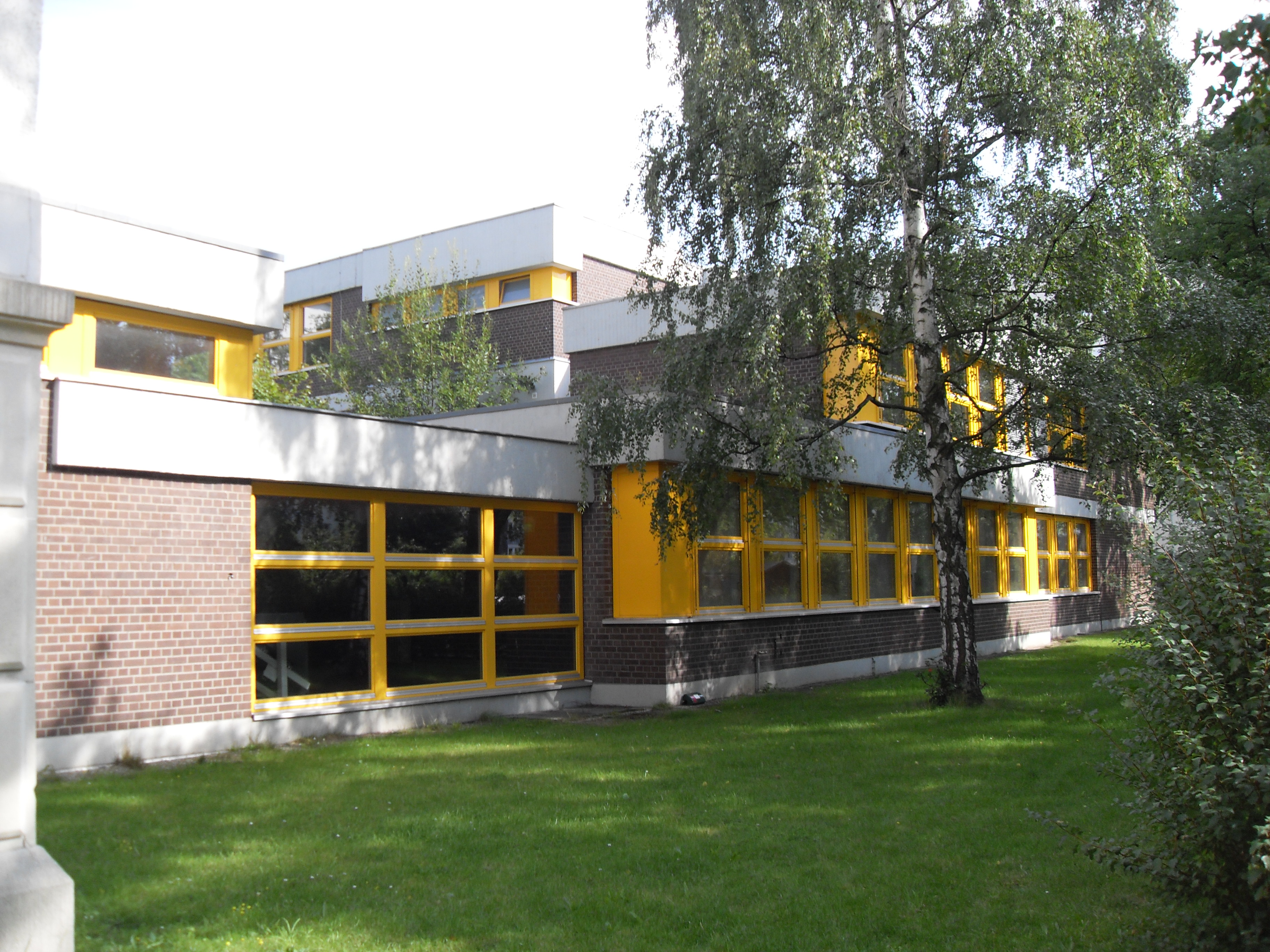 Campus Schöneberg Haus C und Berlin Professional School (BPS)